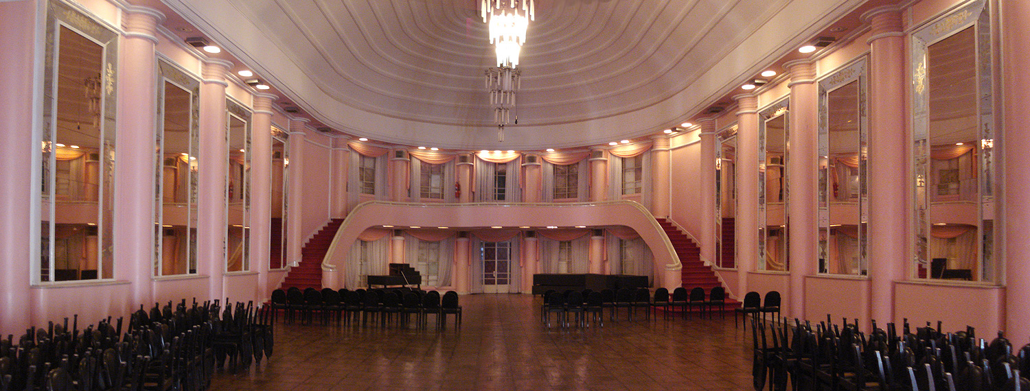 Salão de Bailes do Clube do Comércio de Porto Alegre, Brasil. Inaugurado em 1939-40.